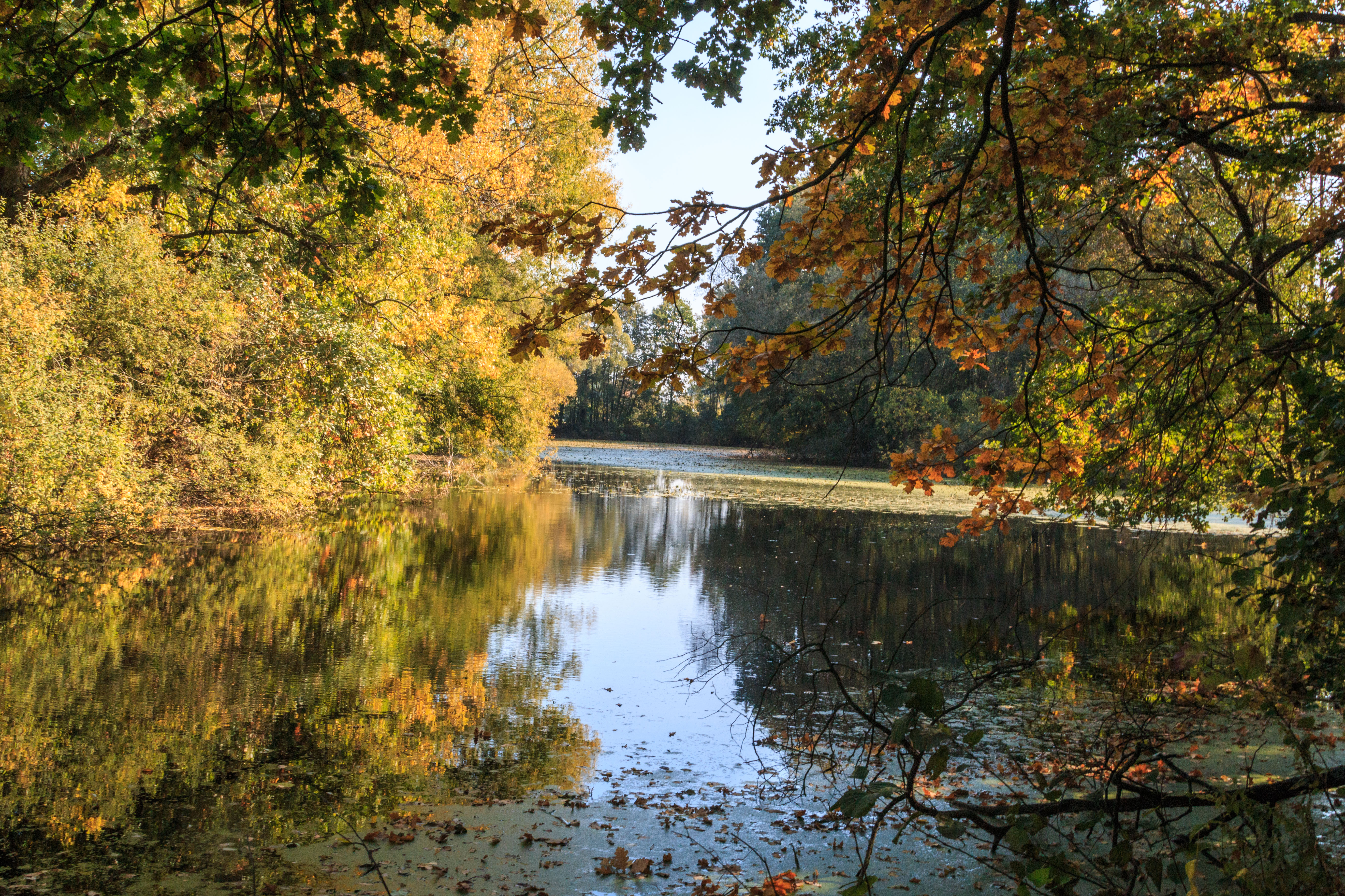 Binarovo jezero - mrtvé rameno Orlice u Hradce Králové Project: Vodstvo